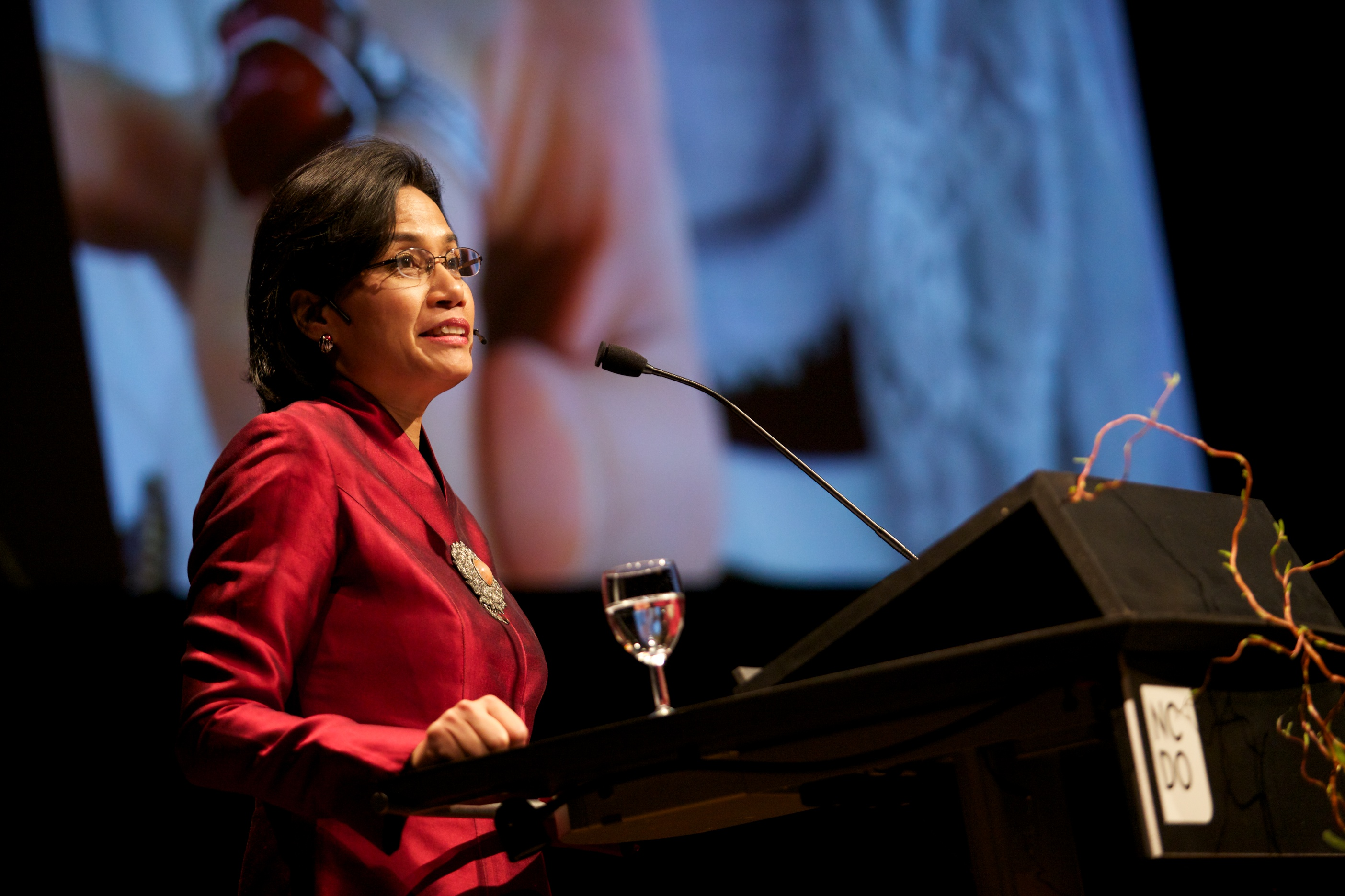 Dr. Sri Mulyani @ 40 jaar NCDO